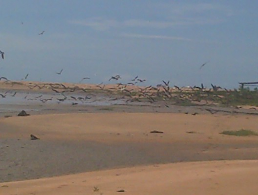 Enige vogels bij de lagune op Braamspunt